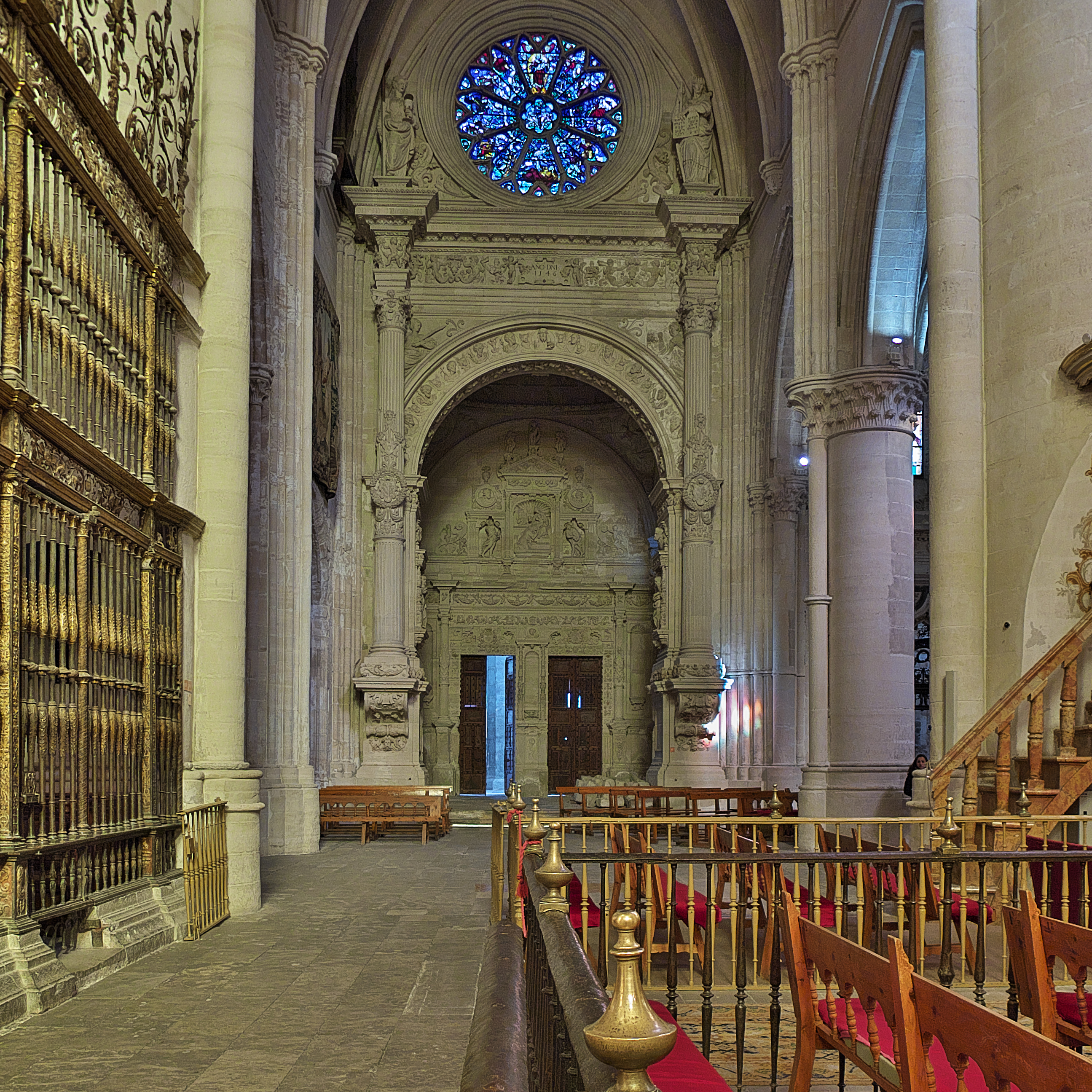 Sebastián Ramírez de Fuenleal, obispo de Cuenca (1542-1547), contrata a su costa al entallador Esteban Jamete de amplia formación adquirida de arquitectos y escultores como Luis de Vega, Alonso de Covarrubias, Bonifacio Bernardino de Tovar, Andrés de Vandelvira, Roque Balduque o, Diego de Riaño en la obra de la Casa Consitorial de Sevilla (ca. 1545) de la que partiría a Cuenca para proyectar la puerta de la catedral al claustro catedralicio con el Arco de Jamete (1546) que lo consagrará como importante artífice del Renacimiento español